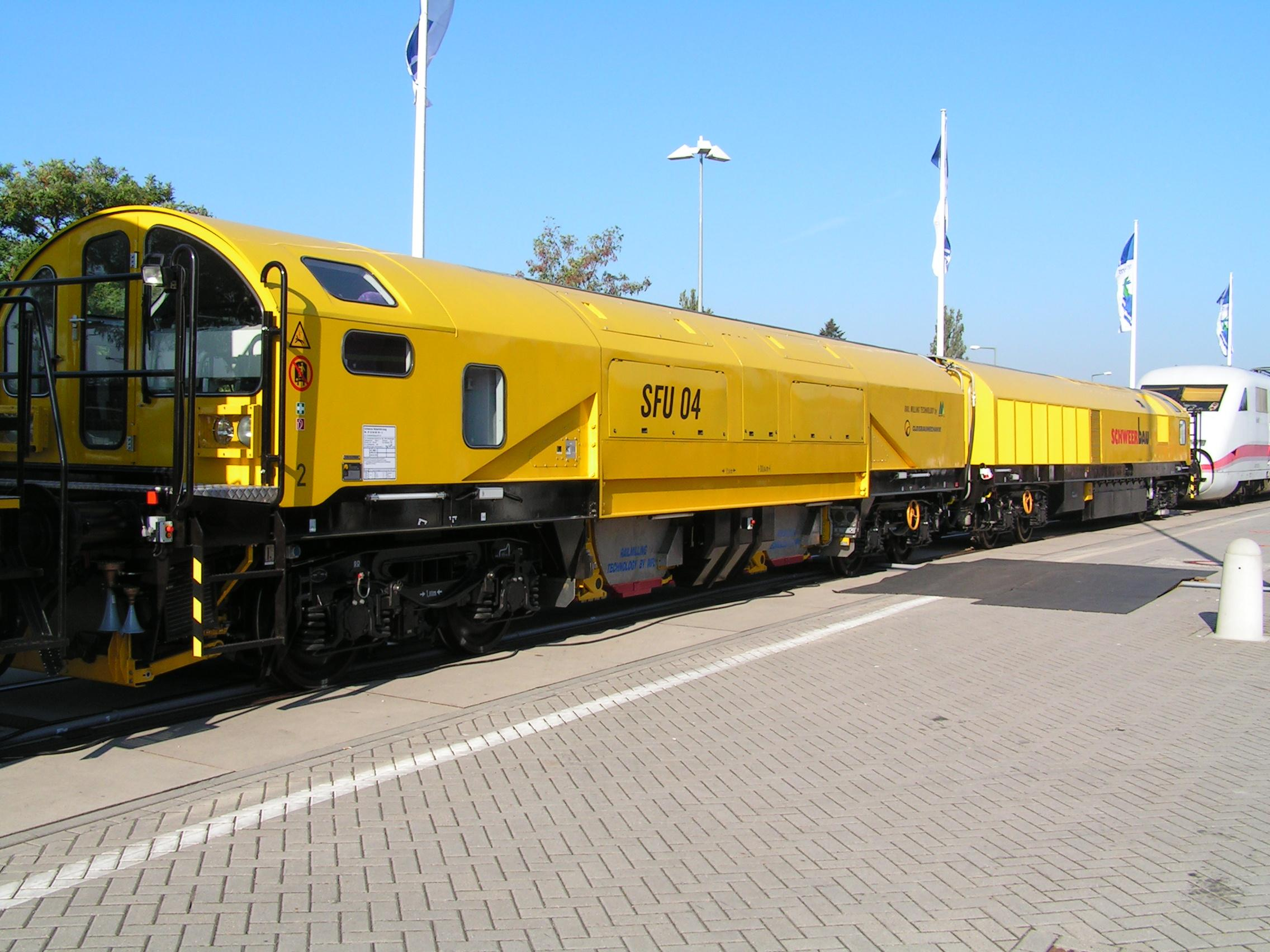 Schienenfräszug SFU 04 mit besonders kleinem Fahrzeugumgrenzungsprofil, einsetzbar auch auf den Kleinprofil-Röhrenbahnstrecken der U-Bahn London.